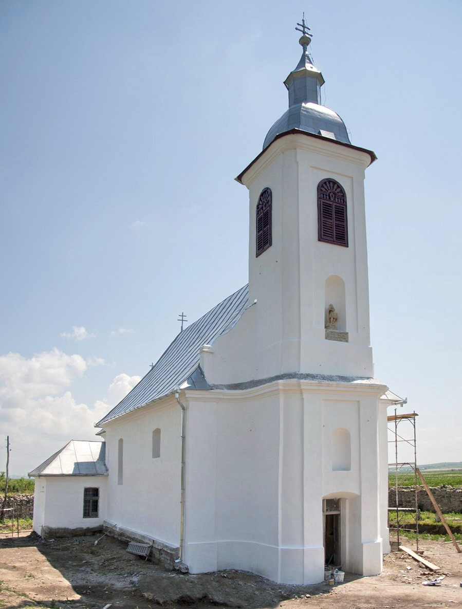 Corneşti (Mihai Viteazu), judeţul Cluj, Biserica Romano-Catolică